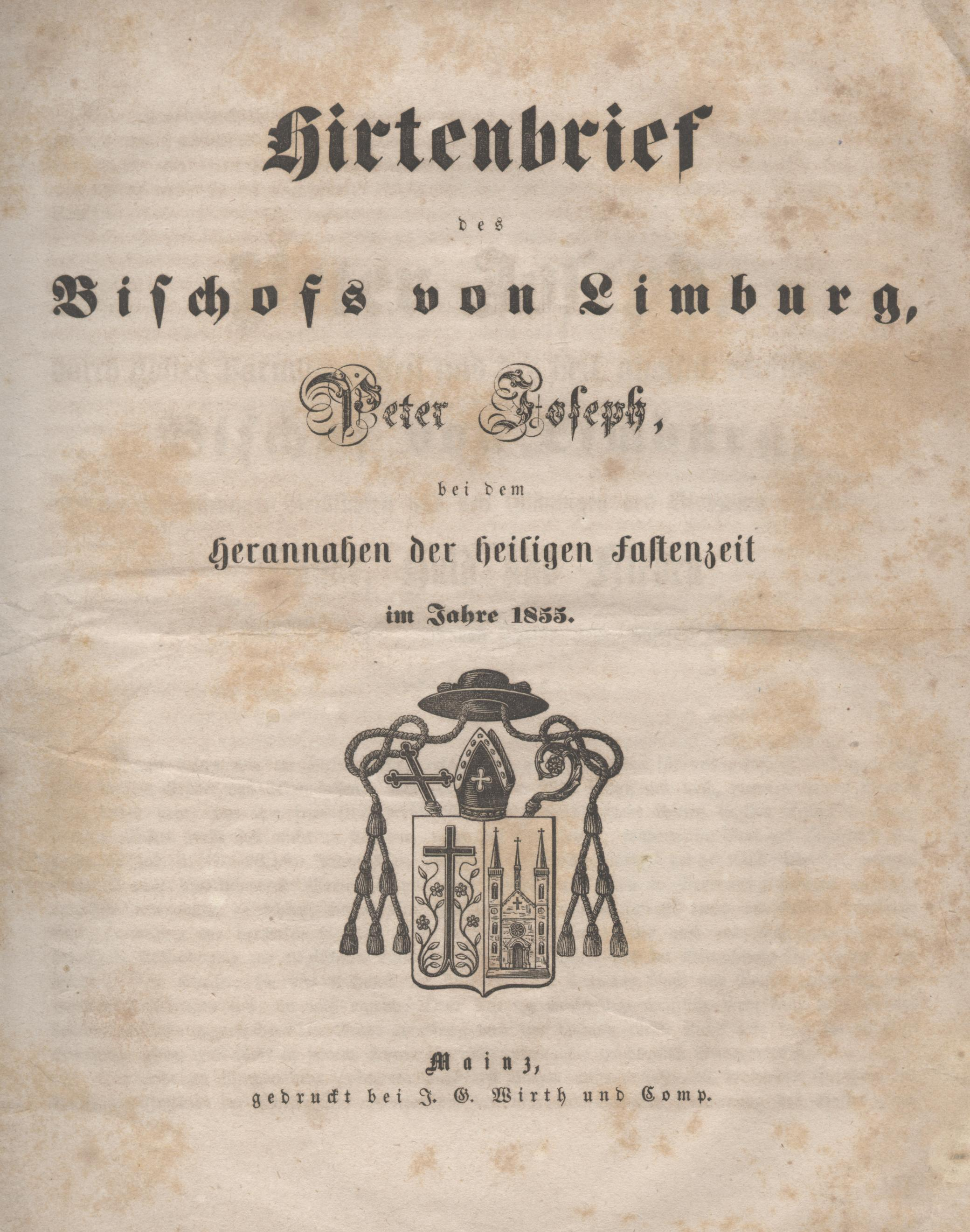 Bischof Peter Joseph Blum, Limburg, Hirtenbrief